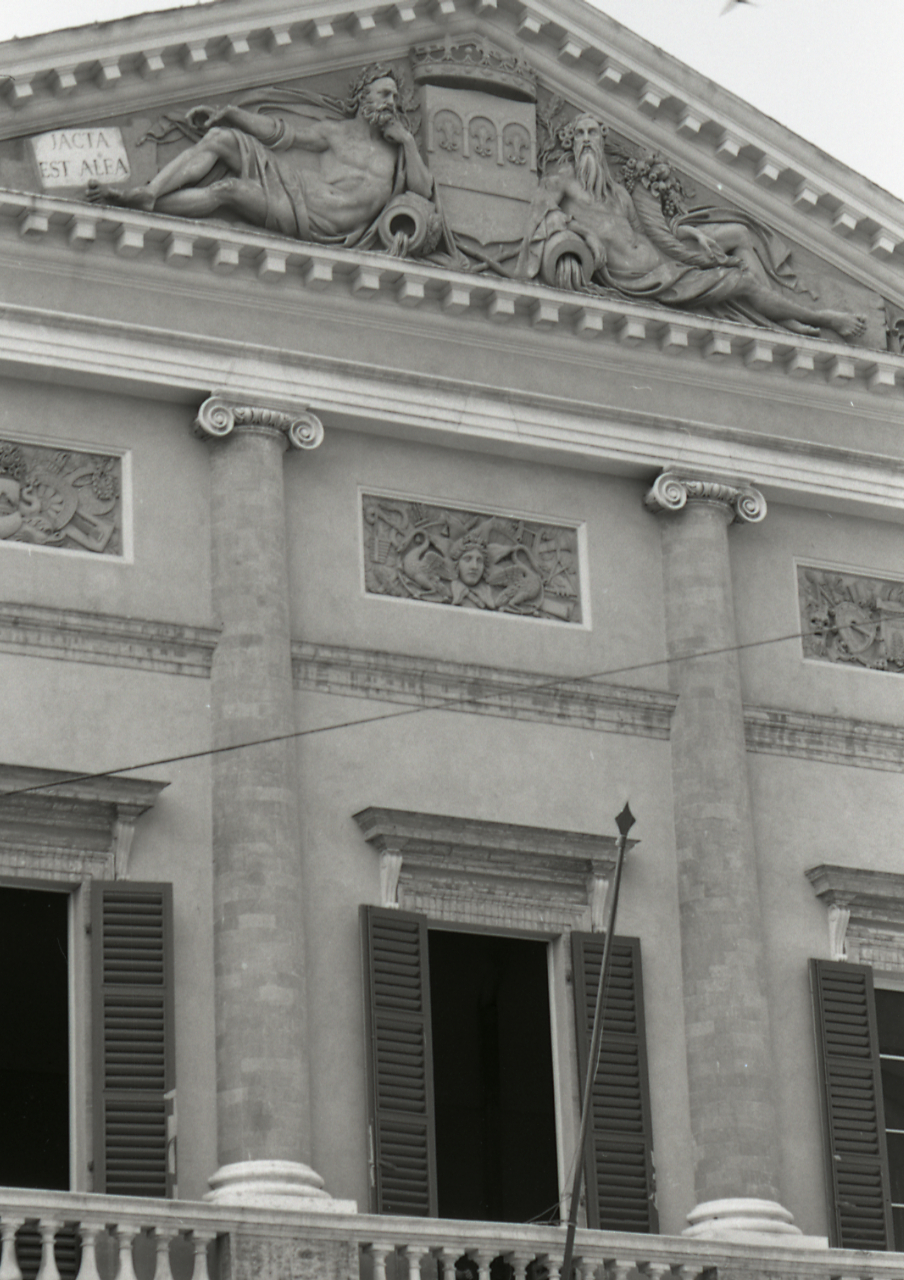 Servizio fotografico : Cesena, 1972 / Paolo Monti. - Strisce: 7, Fotogrammi complessivi: 36 : Negativo b/n, gelatina bromuro d'argento/ pellicola ; 35 mm. - ((Sul portanegativi: NIKMAT FP4. - Occasione: Campagna di rilevamento (prima) del centro storico. - Fonte: Agenda di Paolo Monti: Leica 1501-3000 Controllo numerazione (1950-1978), presso Archivio Paolo Monti. - Fonte: Monografia di Dradi Maraldi Biagio, Emiliani Andrea (a cura di): Cesena: il volto della città, Cesena, Banca Popolare di Cesena (1973)